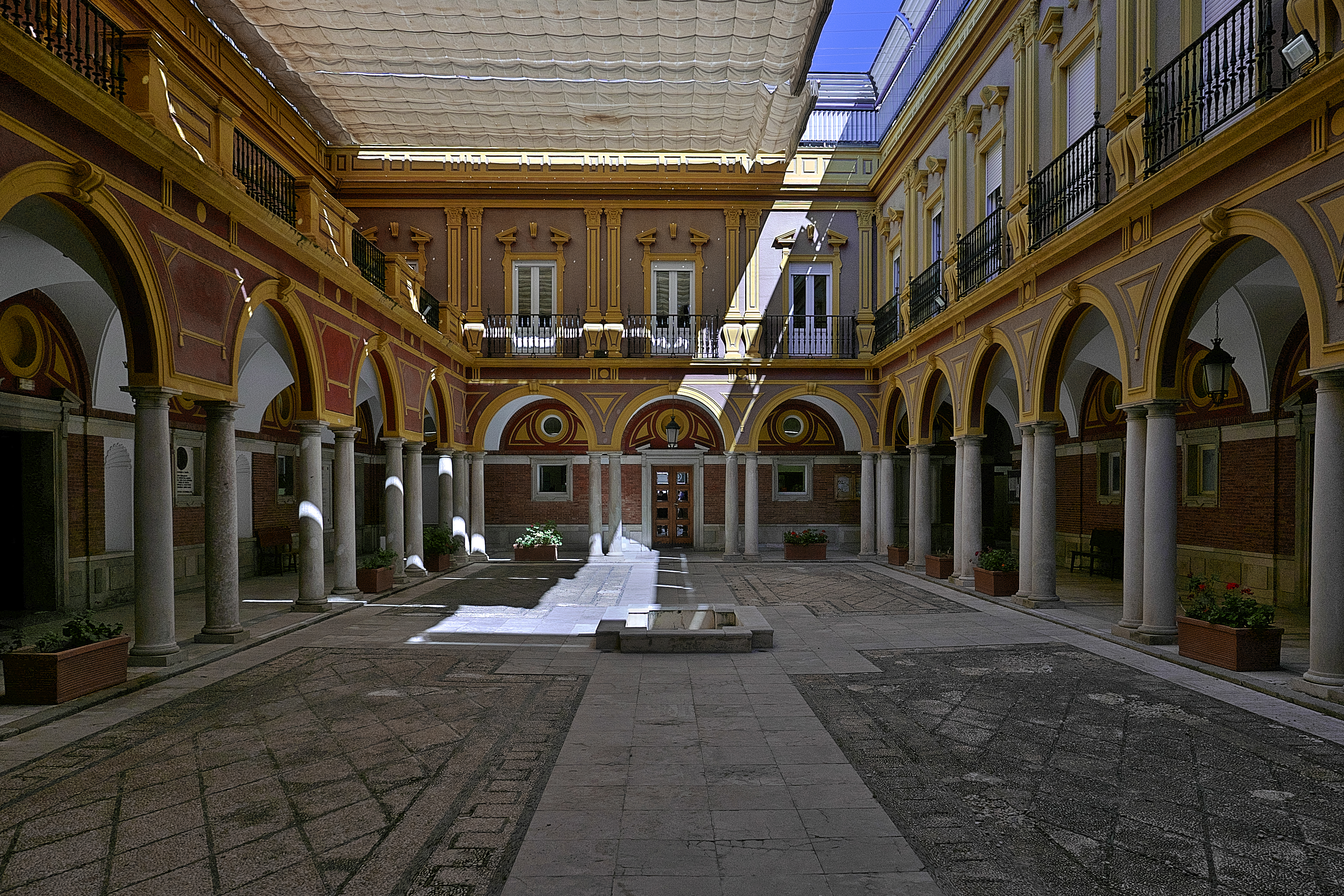 Proyecto de Alejandro Herrero Ayllón (1949)